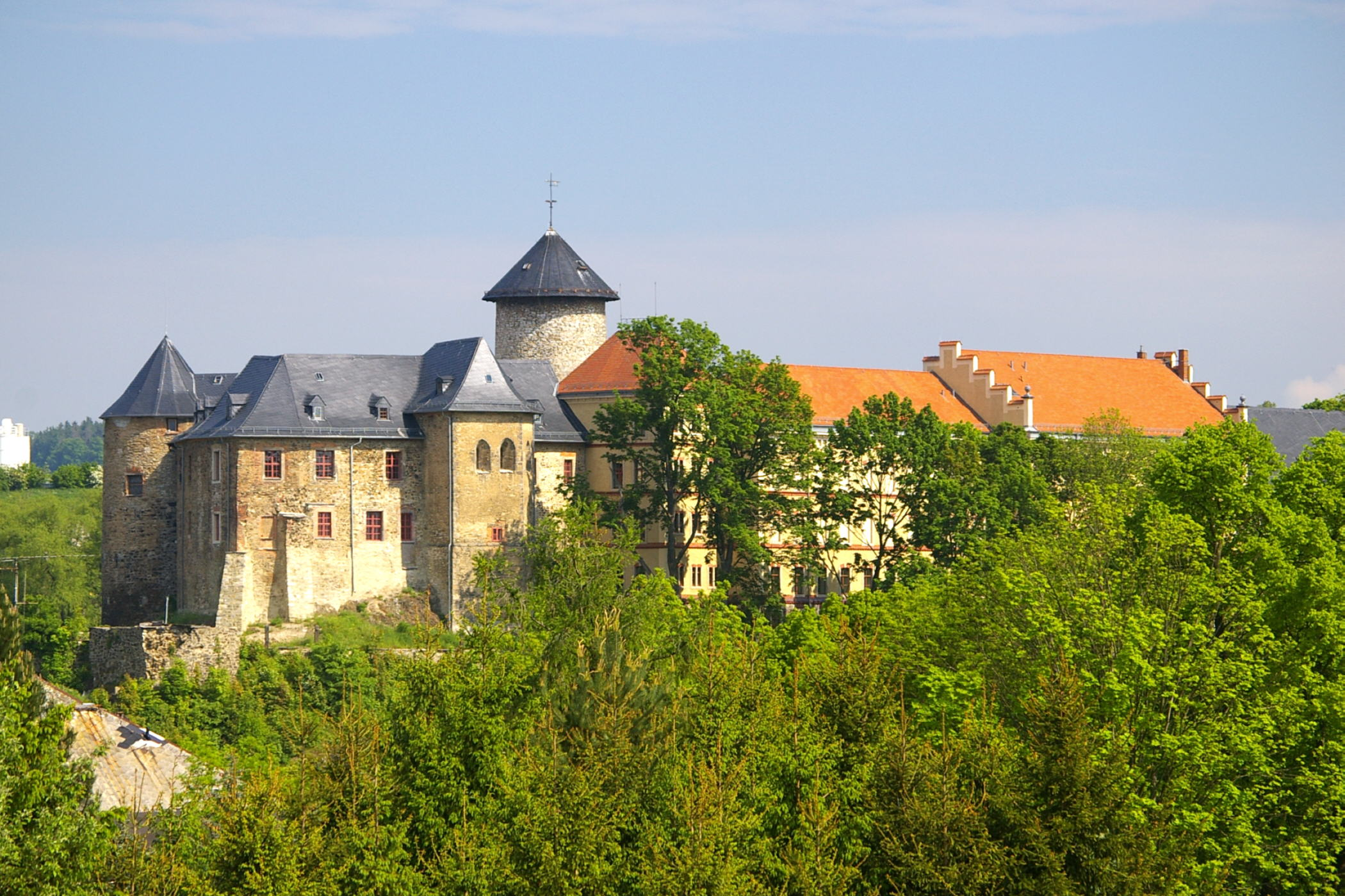 Schloß Voigtsberg Südseite